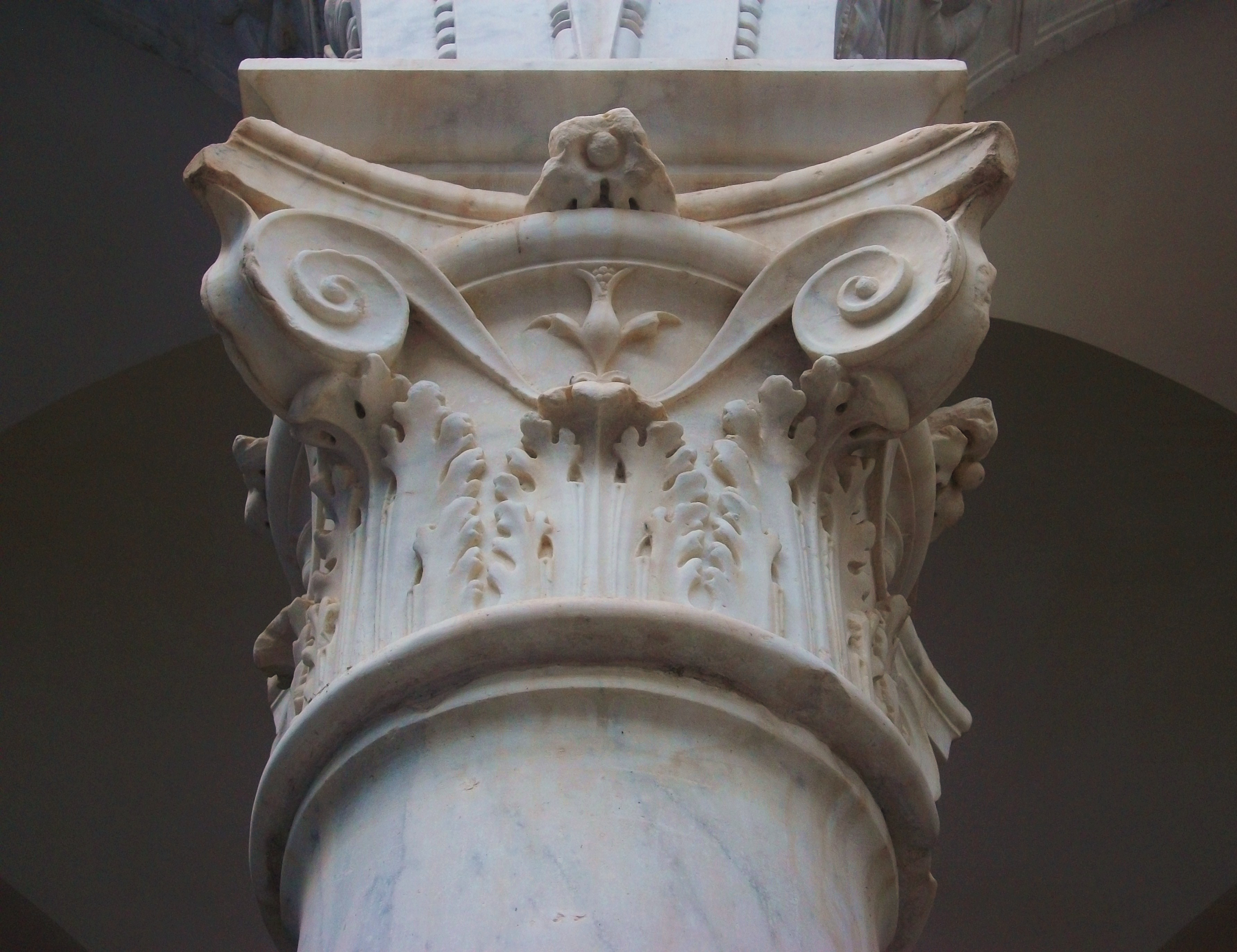 Capitell del pati de l'ambaixador Vich, reconstruït al Museu de Belles Arts de València.